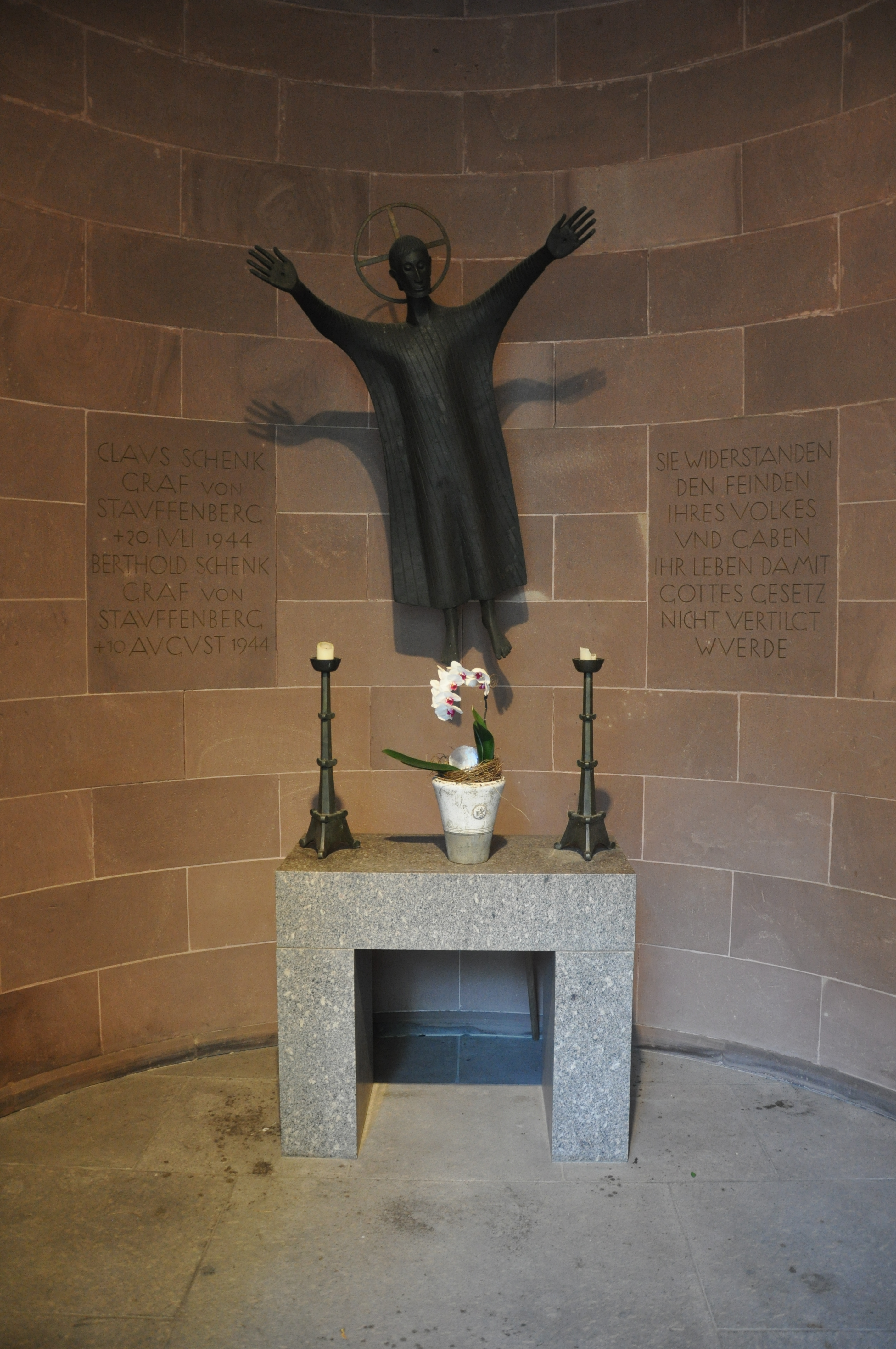 Albstadt-Lautlingen, Stauffenberg-Gedächtniskapelle (neben der Pfarrkirche St. Johannes Baptista), Blick von außen in die offene Kapelle (mit Skulptur von Gerhard Marcks)